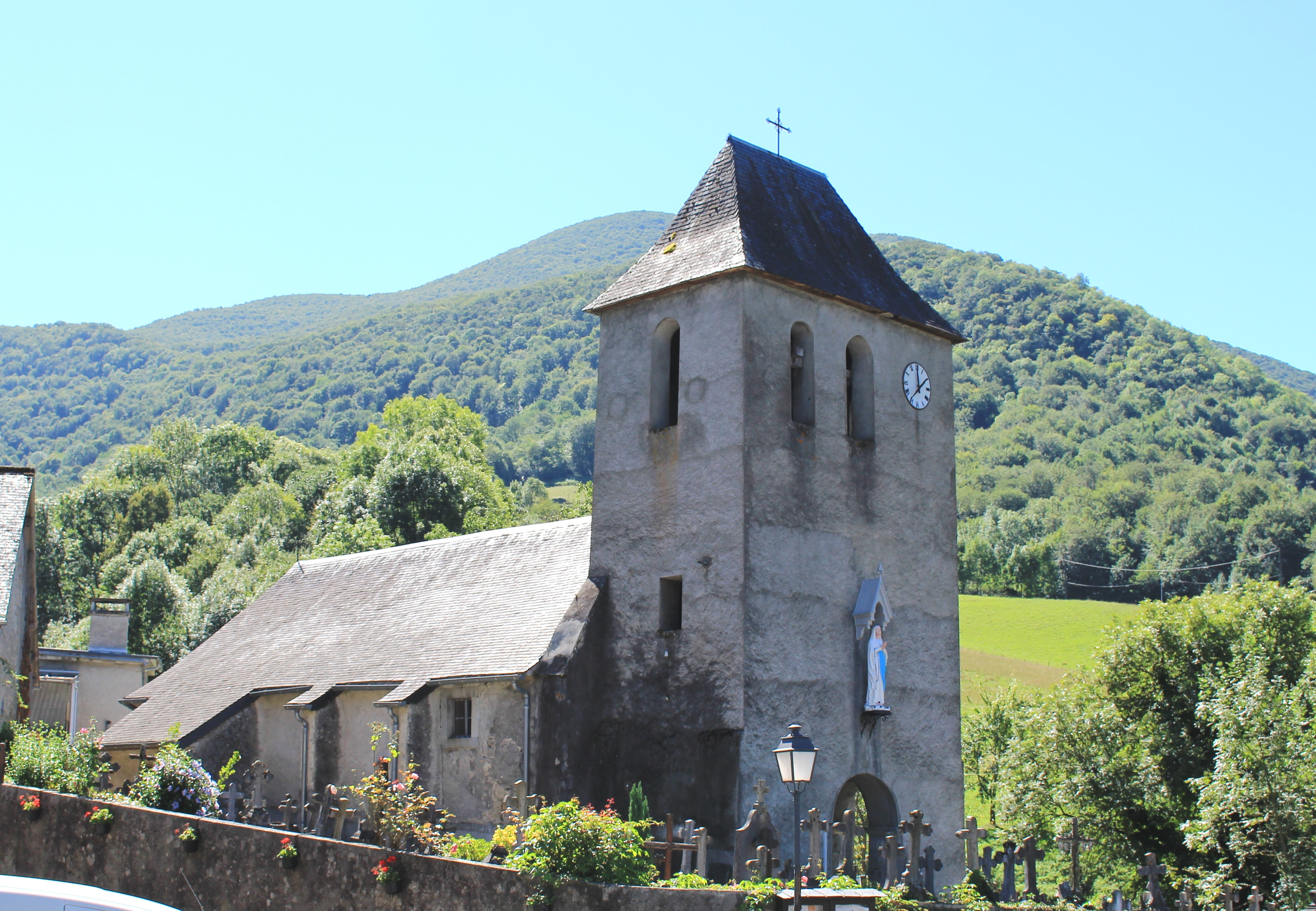 Église de l'Assomption d'Esparros (Hautes-Pyrénées)